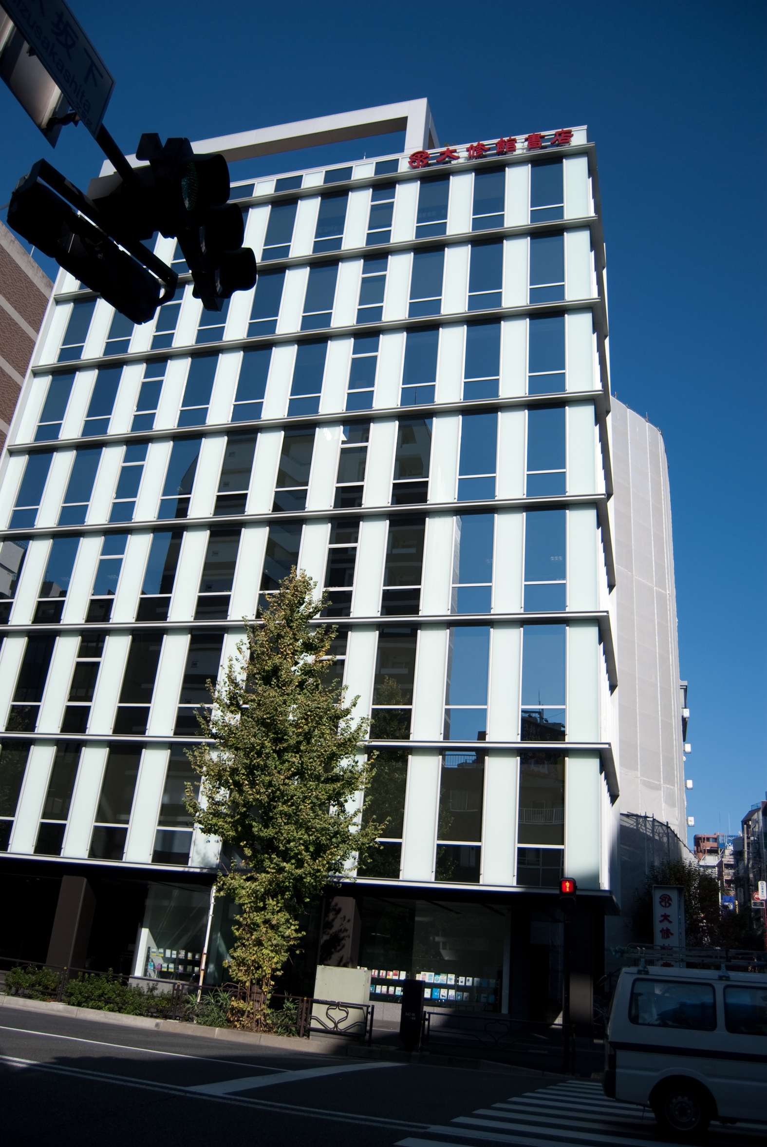 大修館書店本社ビル